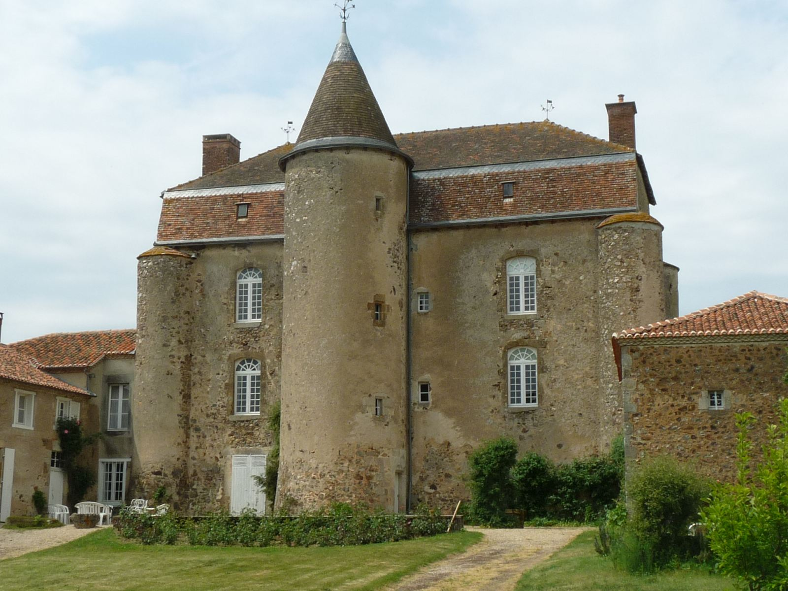 château de Fayolle, Abzac (16), France